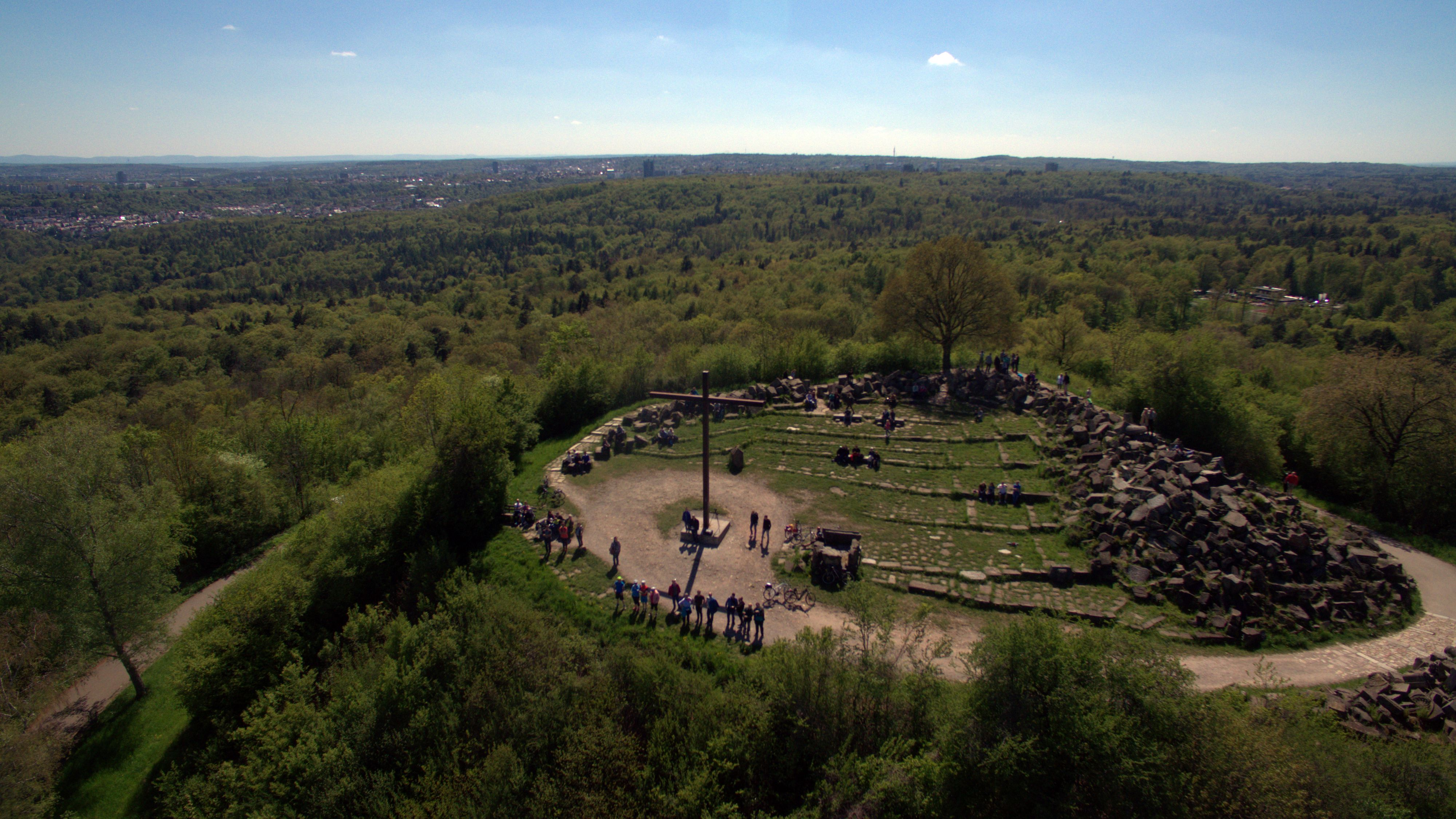 Luftaufnahme vom Birkenkopf in Stuttgart. Auf dem "Monte Scherbelino" genannten Berg im Stuttgarter Südwesten wurden nach dem zweiten Weltkrieg Trümmer aufgeschüttet, wodurch der Berg 40 Meter an Höhe gewann.